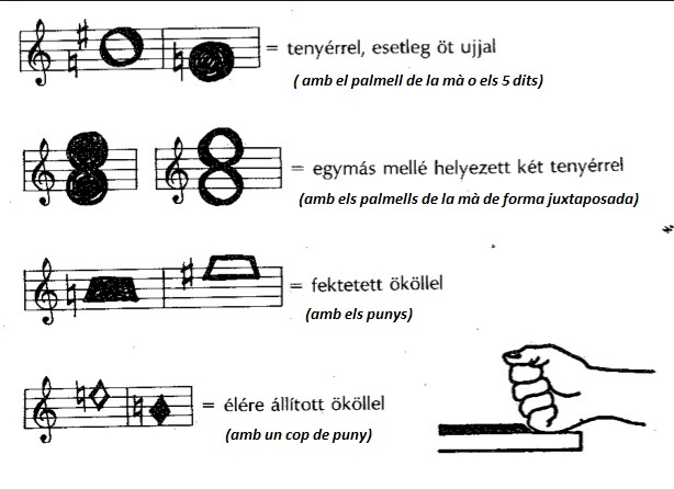 Exemples d'algune de les diverses formes de tocar en el piano en Játékok